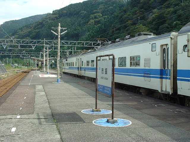 北陸本線 市振駅ホーム 富山行き419系が発車